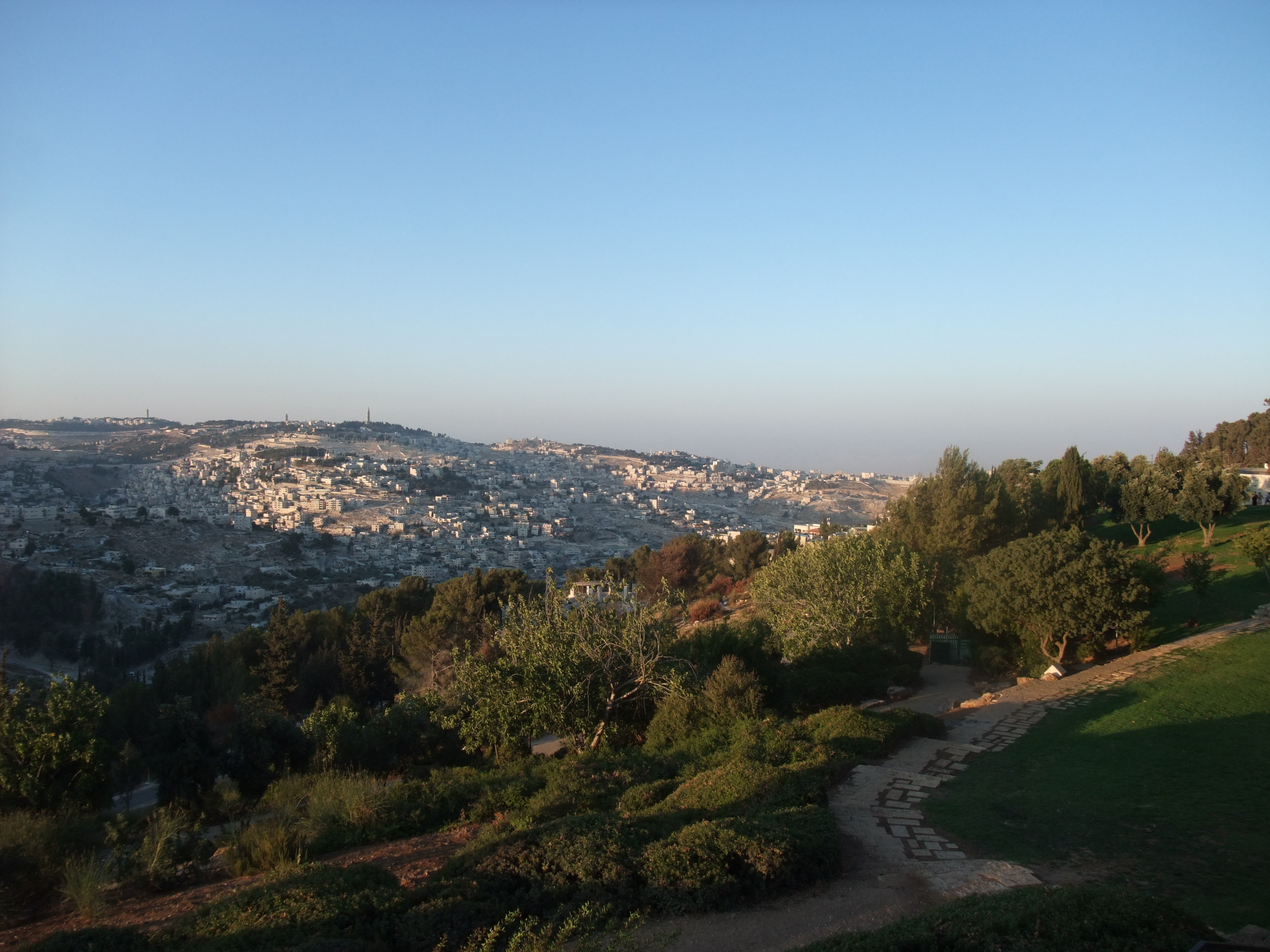 Jerusalem